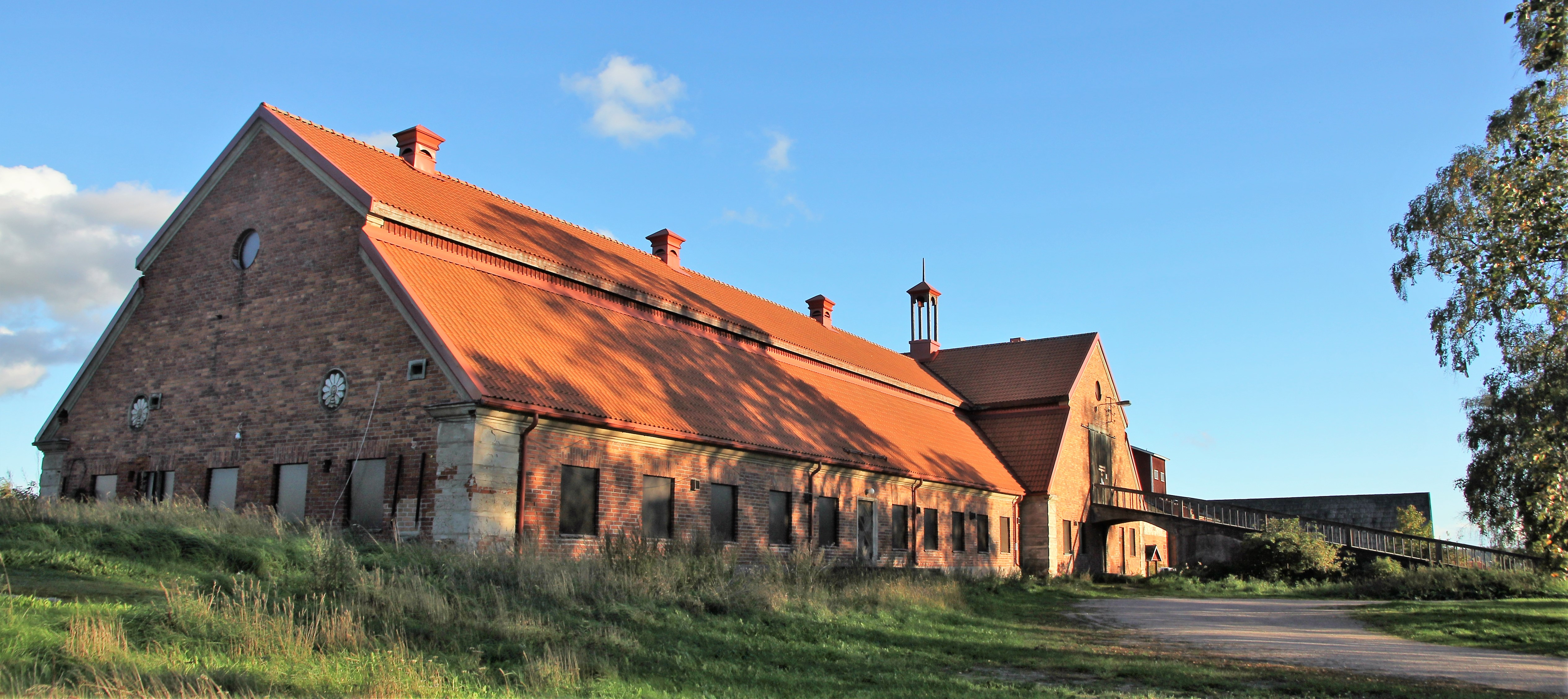 Backaksen kartanon navetta, Ylästöntie 28, Vantaan Pakkalan kaupunginosassa.